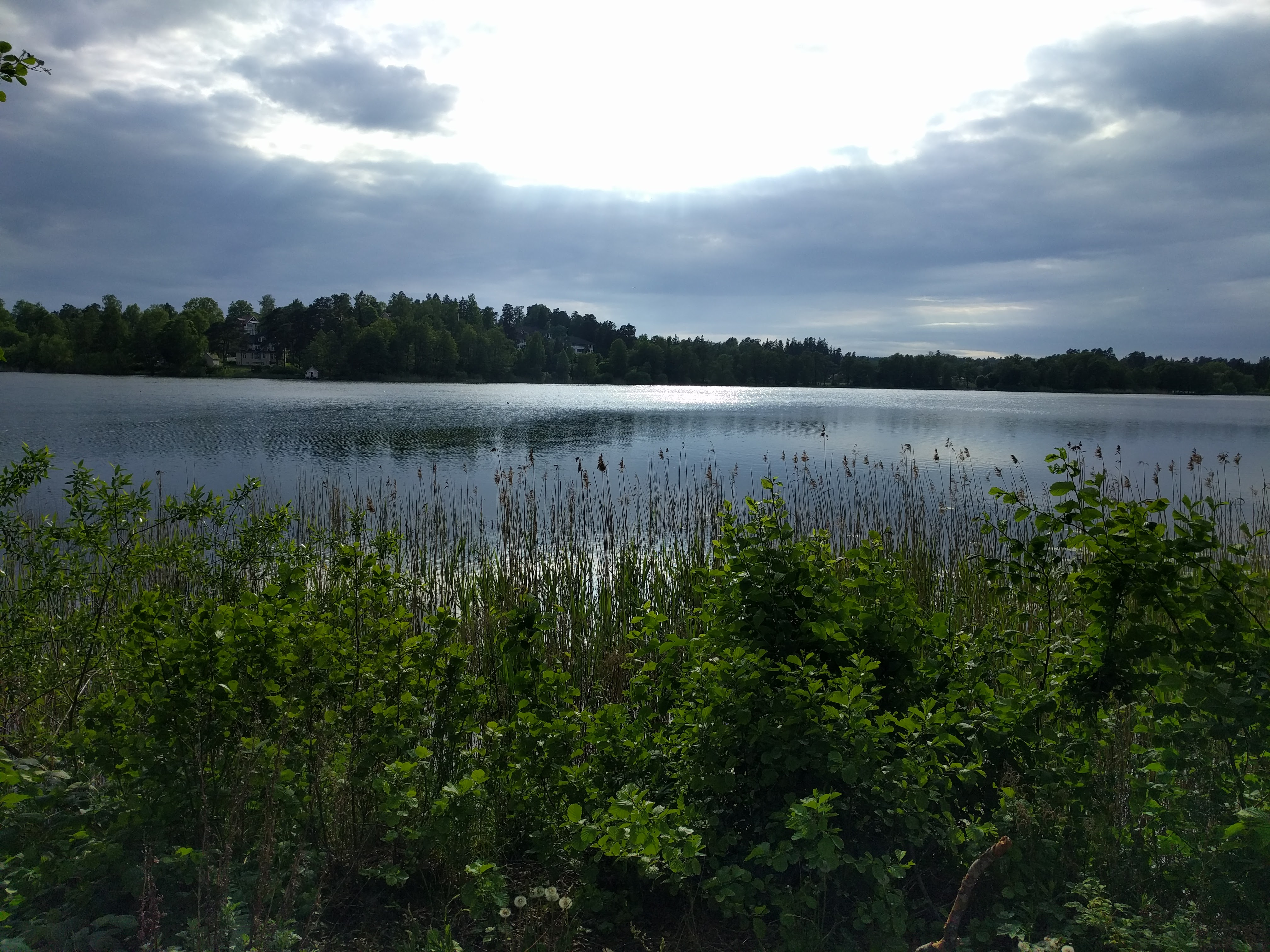 Rönningesjön